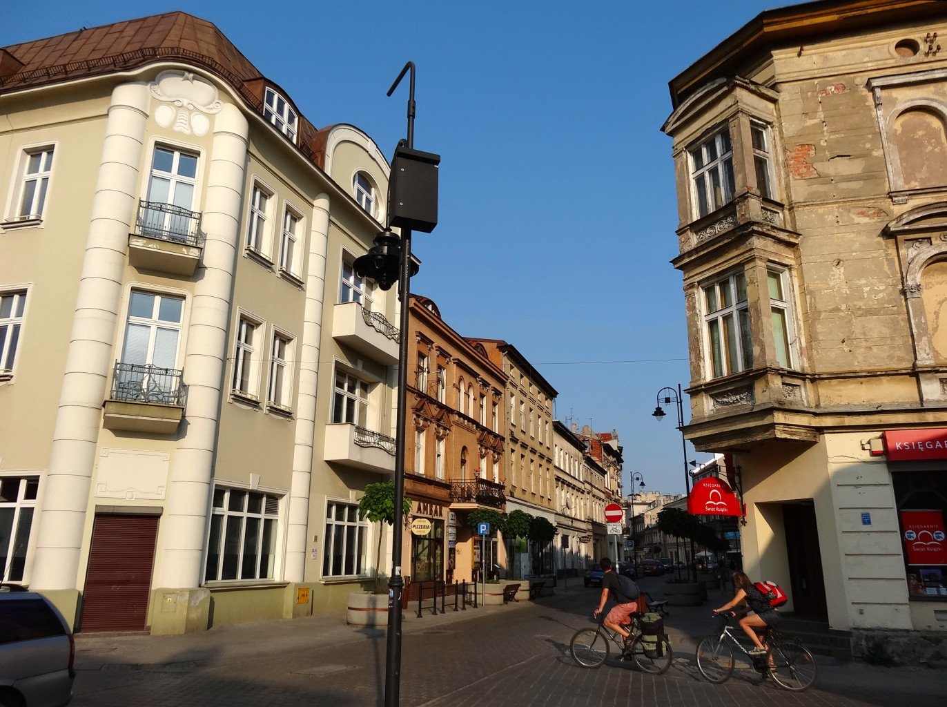 Ulica Dworcowa w Bydgoszczy na odcinku od ul. Gdańskiej do ul. Warmińskiego